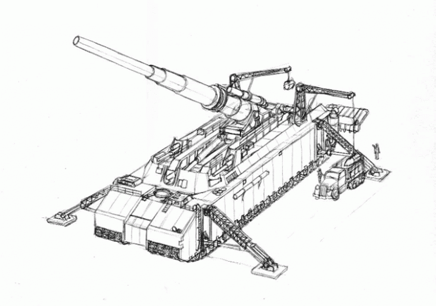 Otra posible variante del 'Monster'. Nótese el blindaje del casco y los soportes laterales.